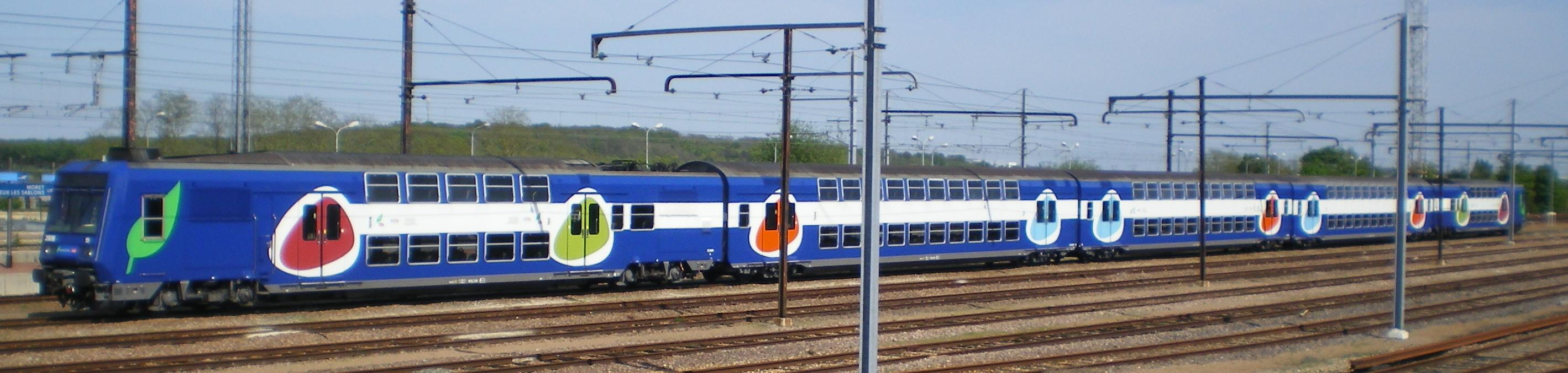 Z20698 (bandeau)